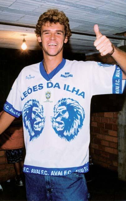 Guga na Ressacada